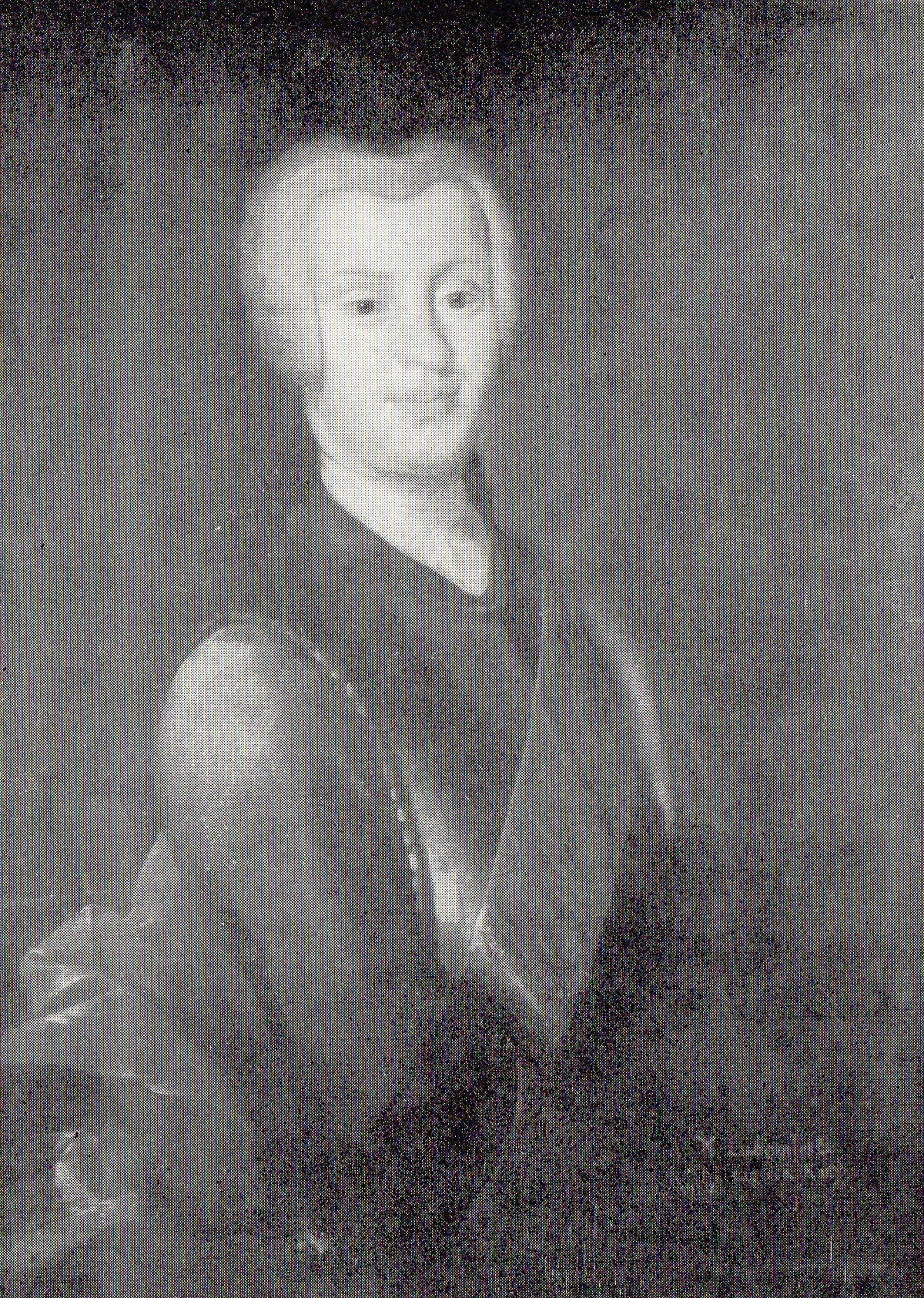 Polski magnat na obrazie z epoki.